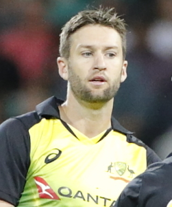 2018.02.03 AUSvNZL T20 NZL innings, SCG-0001, Andrew Tye